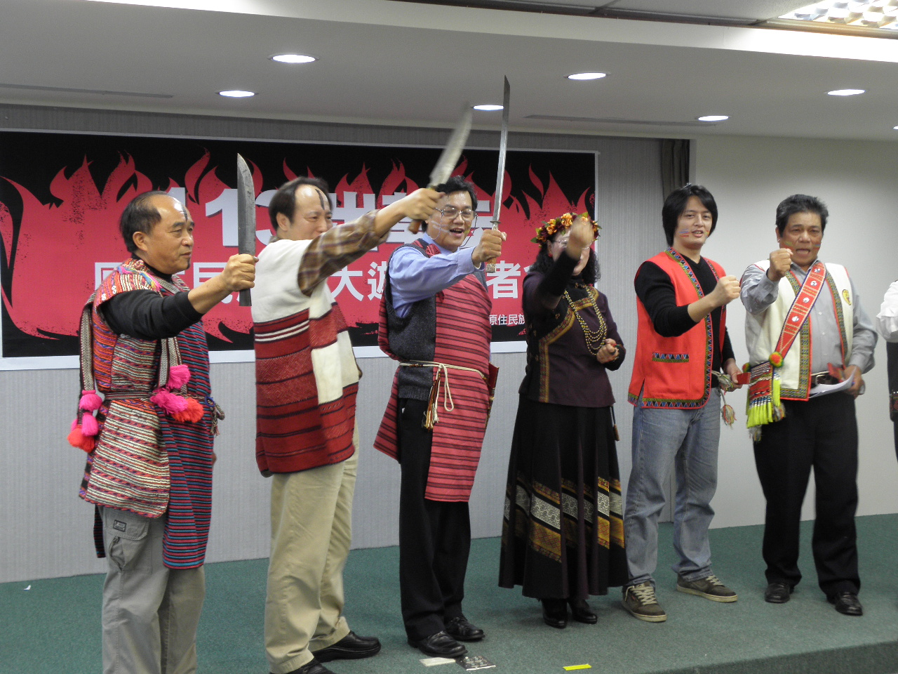 中文（台灣）: 民主進步黨中央黨部舉辦113人民火大一路嗆馬大遊行台灣原住民族代表誓師記者會。